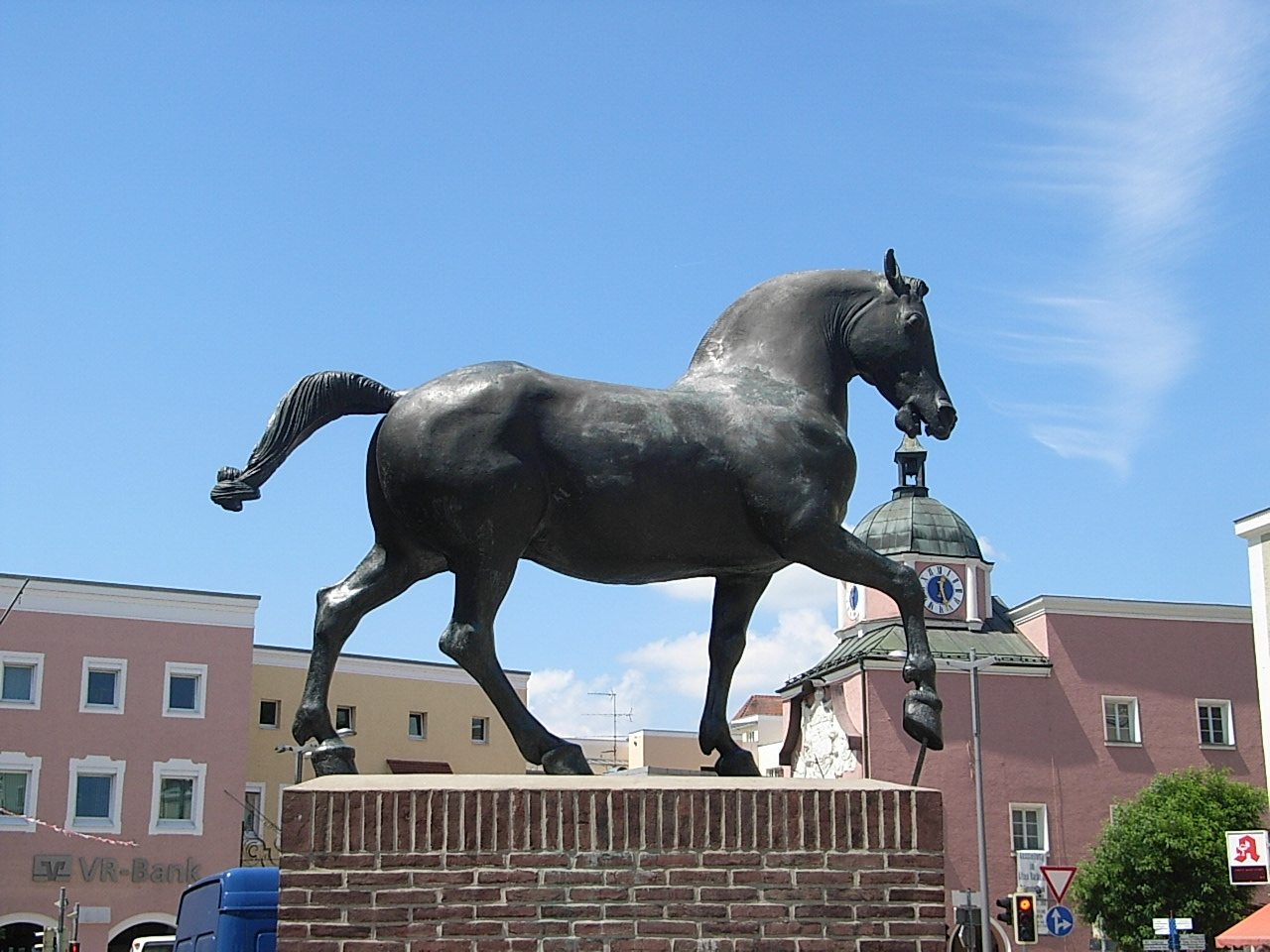 Das Wimmer-Ross in Pfarrkirchen, Niederbayern